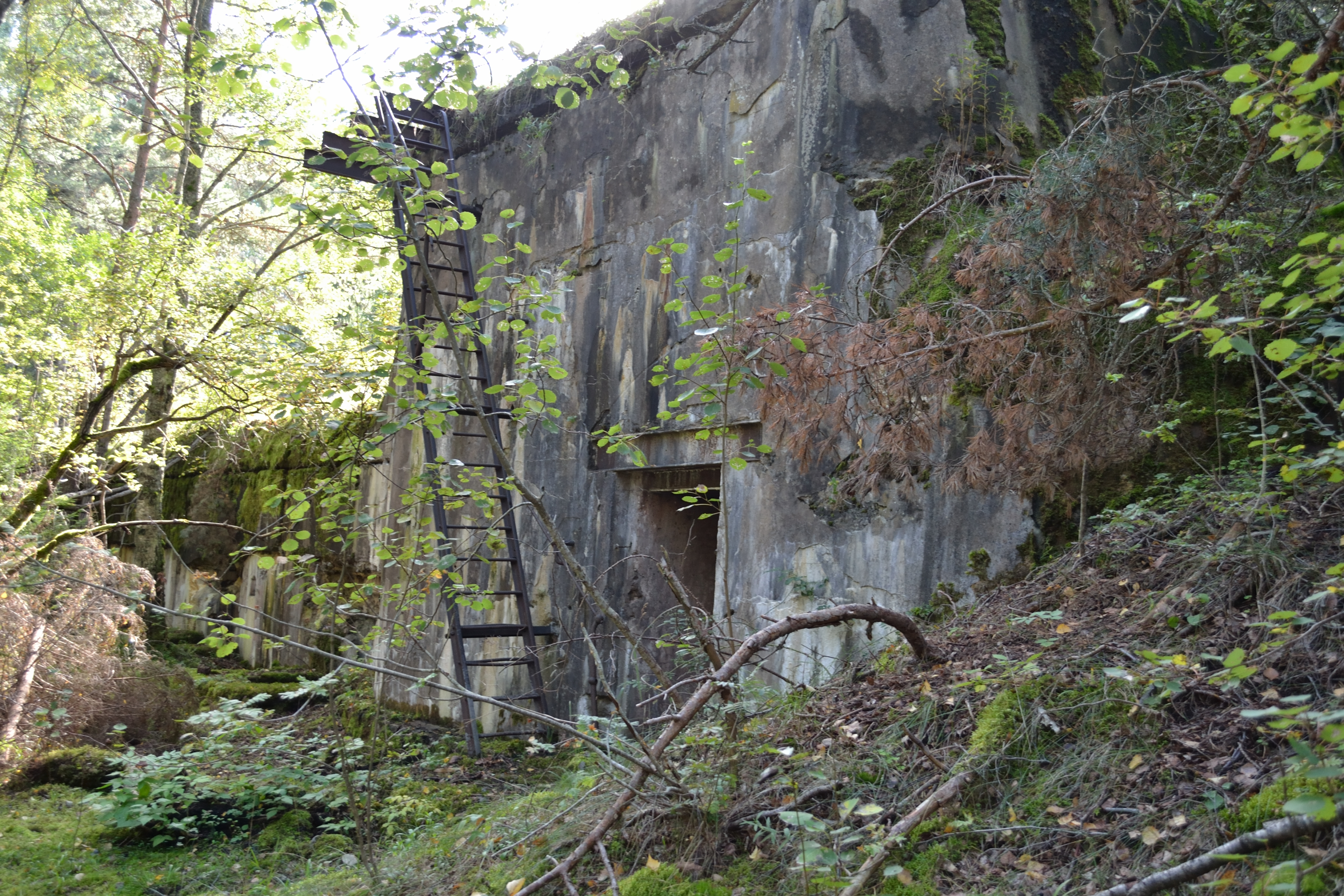 Naissaare rannapatarei nr. 7 -Ameerika